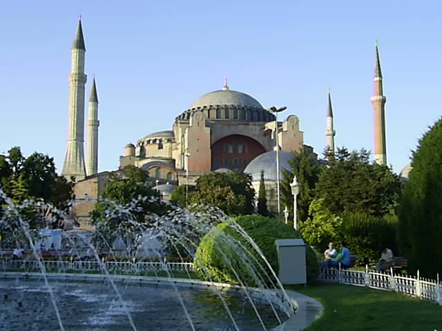 Aya Sofya (Hagia Sophia), Istanbul, Turkey, 2006.